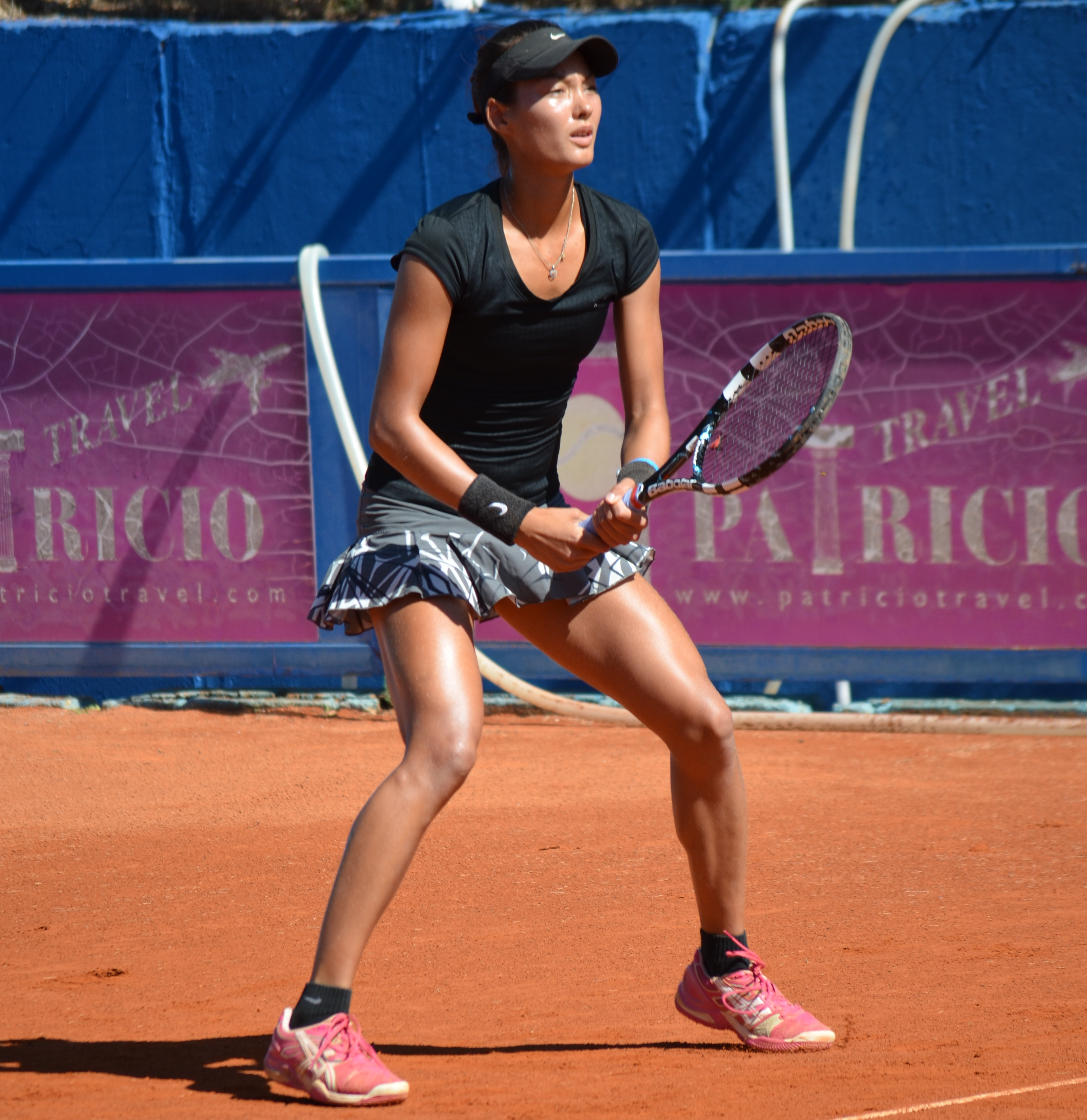 Melanie Stokke bei den BLUESUN CRO CIRCUIT POWER by LUKAS SPORT